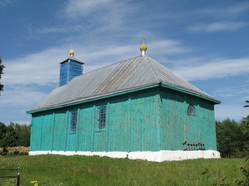 Вялікая Мядзвядка. Царква